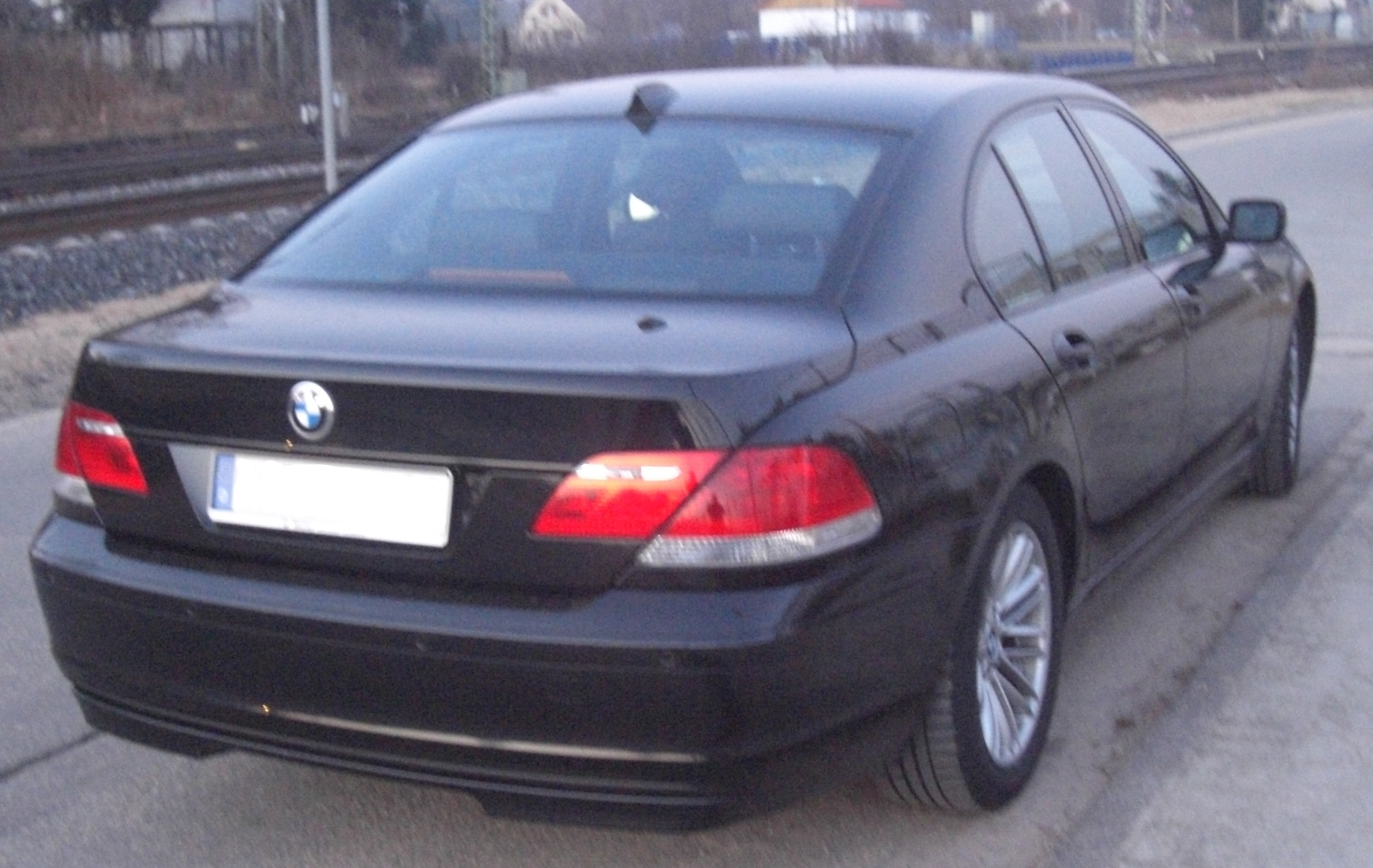 BMW E65